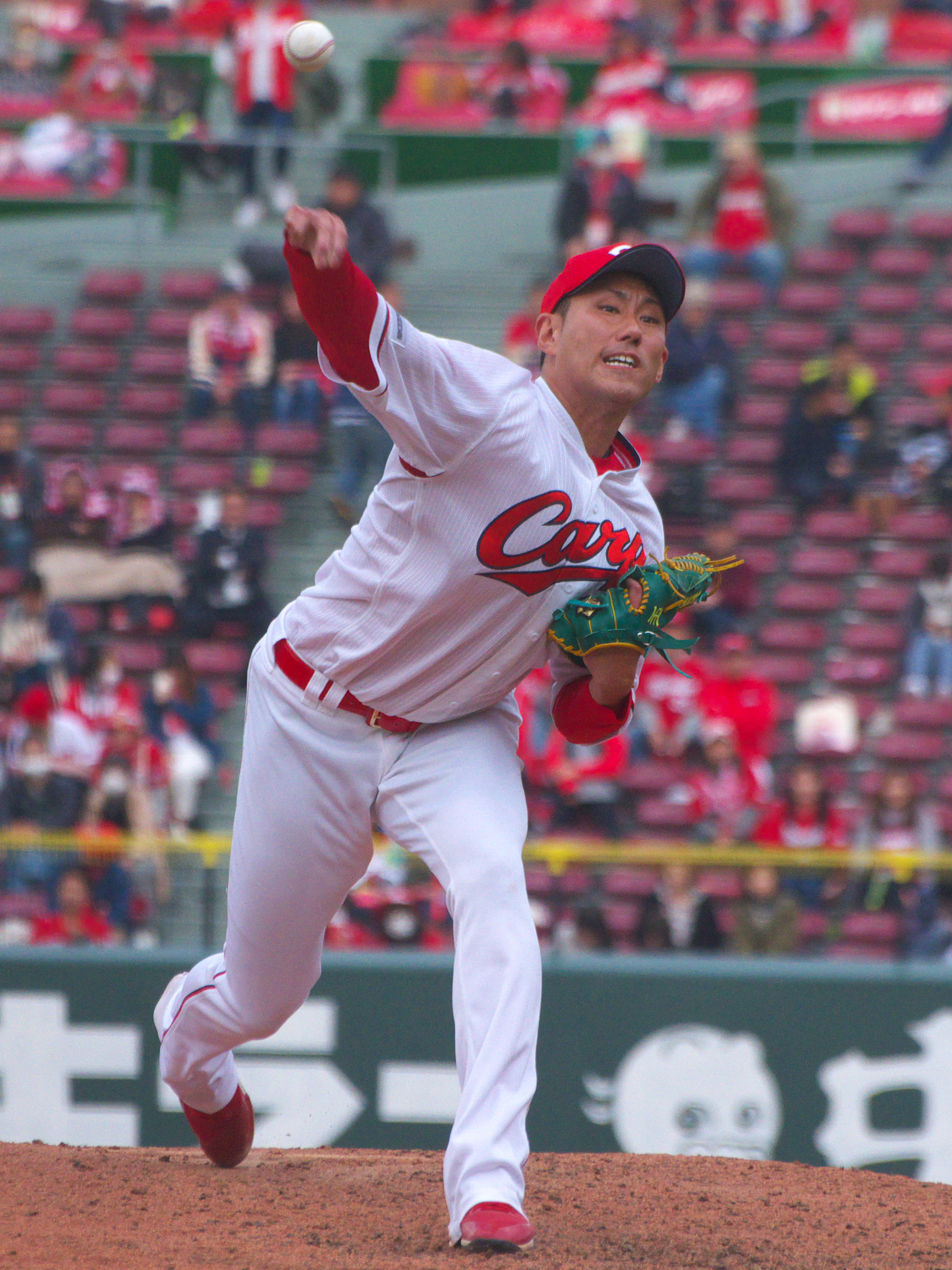 広島東洋カープ中田廉